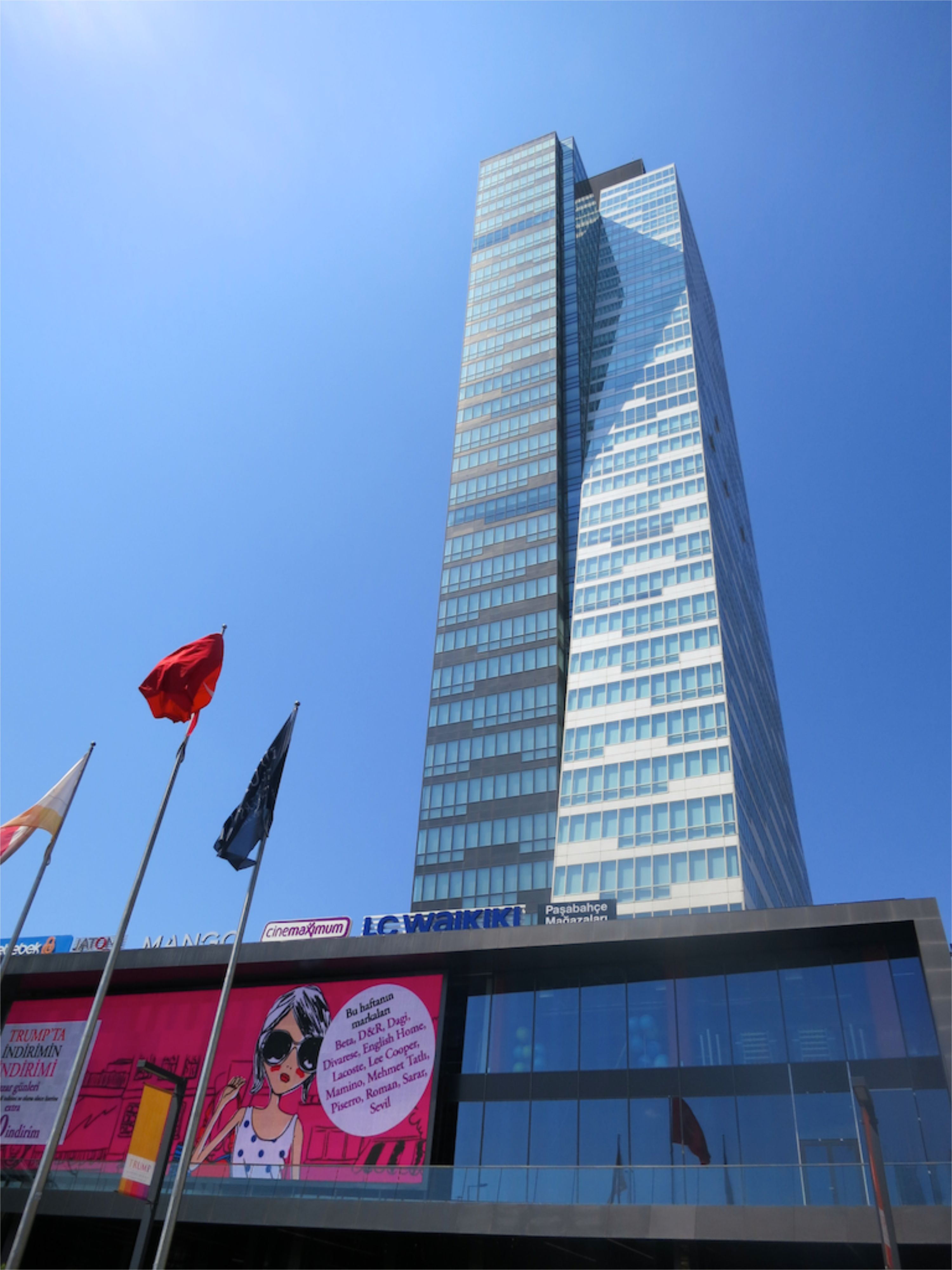 Башня Трампа в Стамбуле. Здесь располагается турецкое отделение Яндекса.